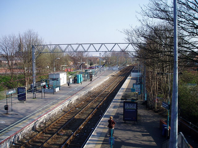 Stretford Metrolink station